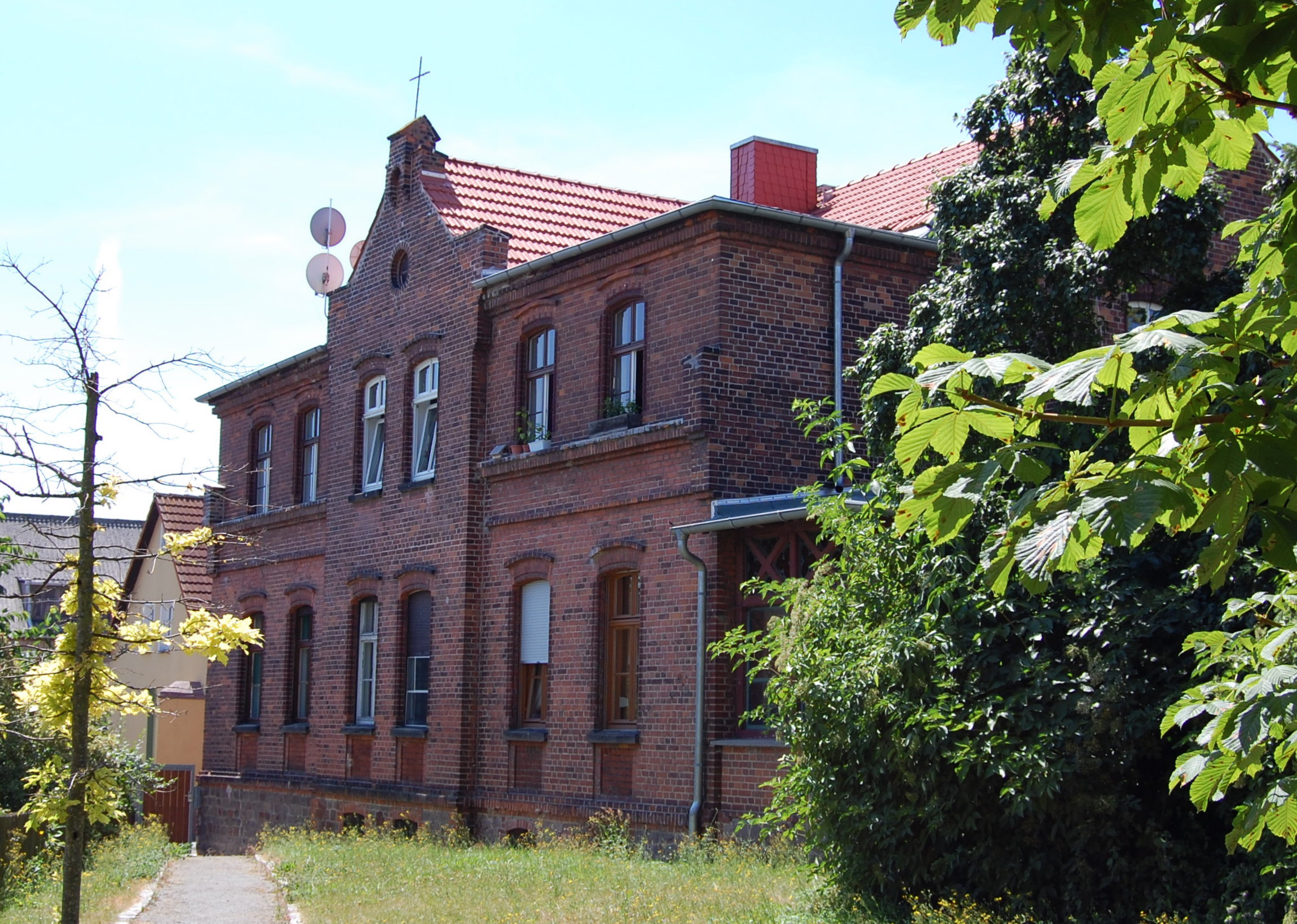 Pfarrhaus in Magdeburg-Westerhüsen